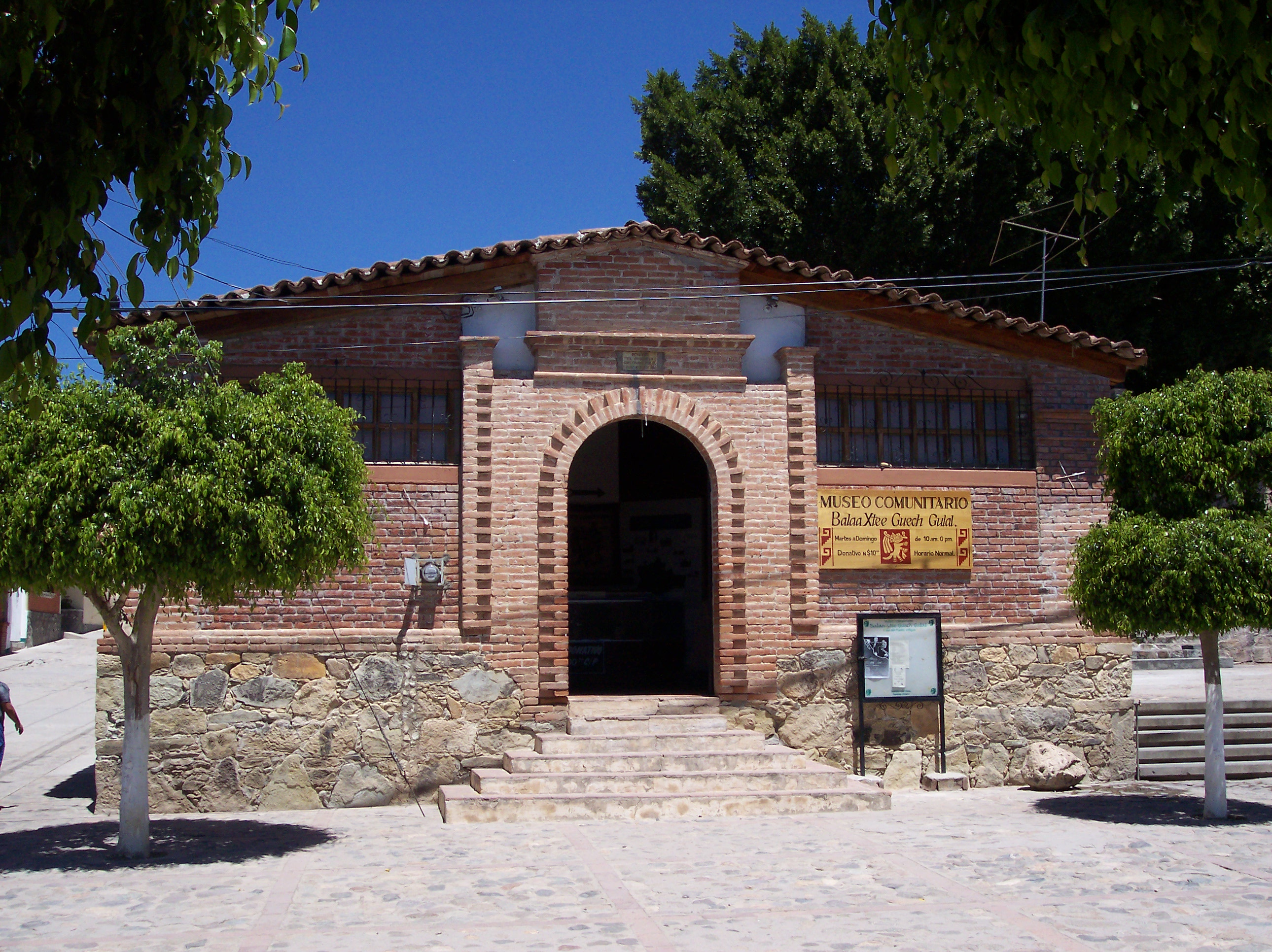 Museum of Teotitlán del Valle town. SPANSIH: Museo comunitario. Located in: Teotitlán del Valle, Oaxaca. Mexico.